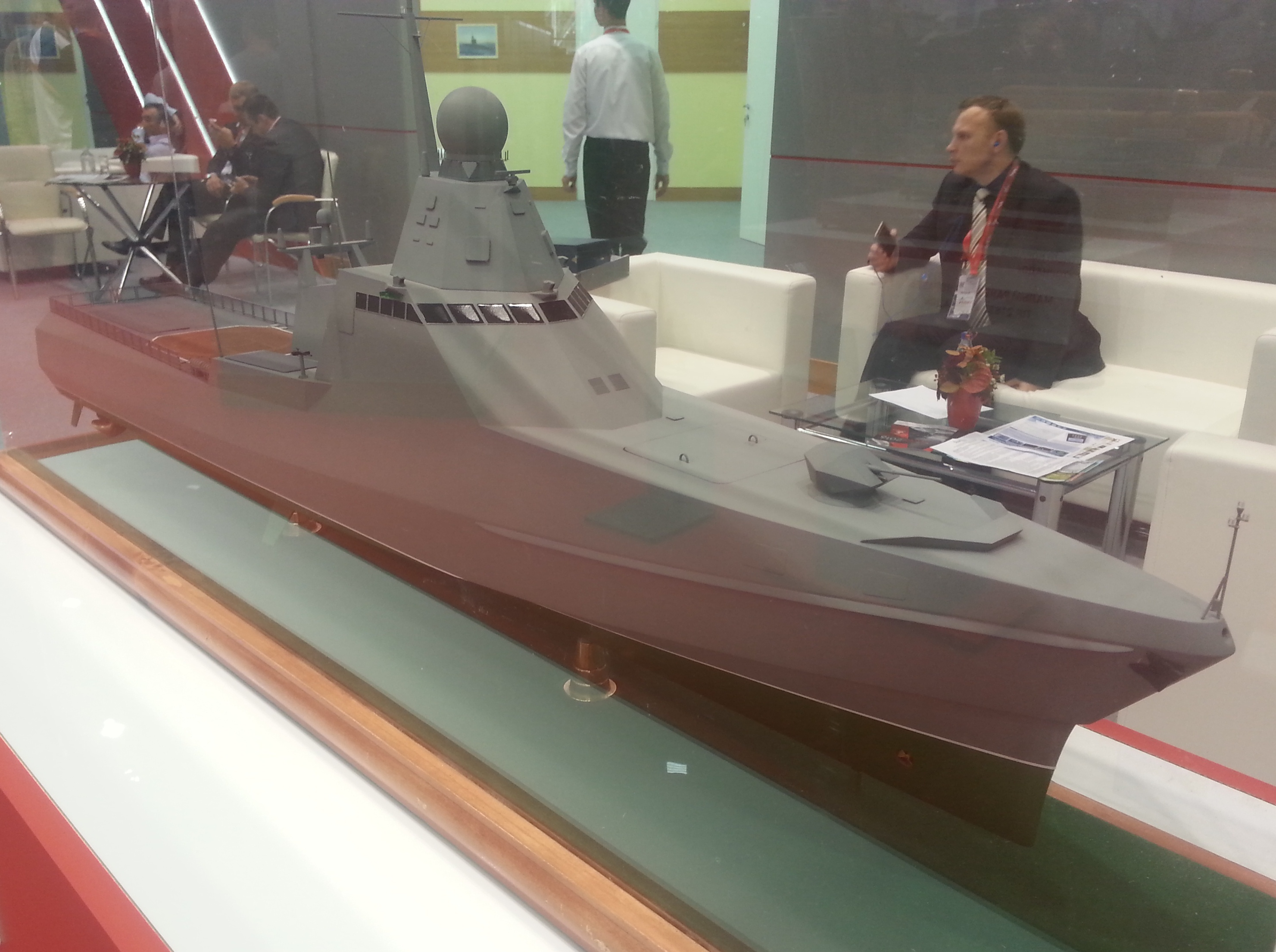 Макет патрульного корабля проекта 22160 на выставке «Армия 2016»